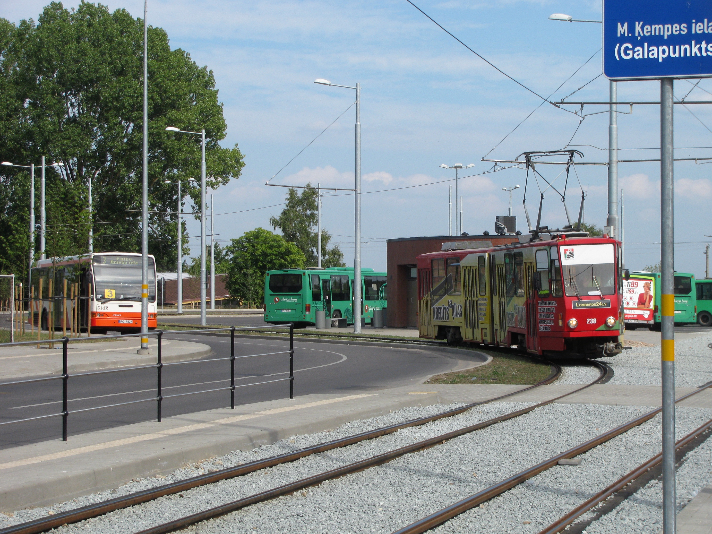 Obratiště tramvají, městských a příměstských autobusů Mirdzas Kempes iela, Liepāja